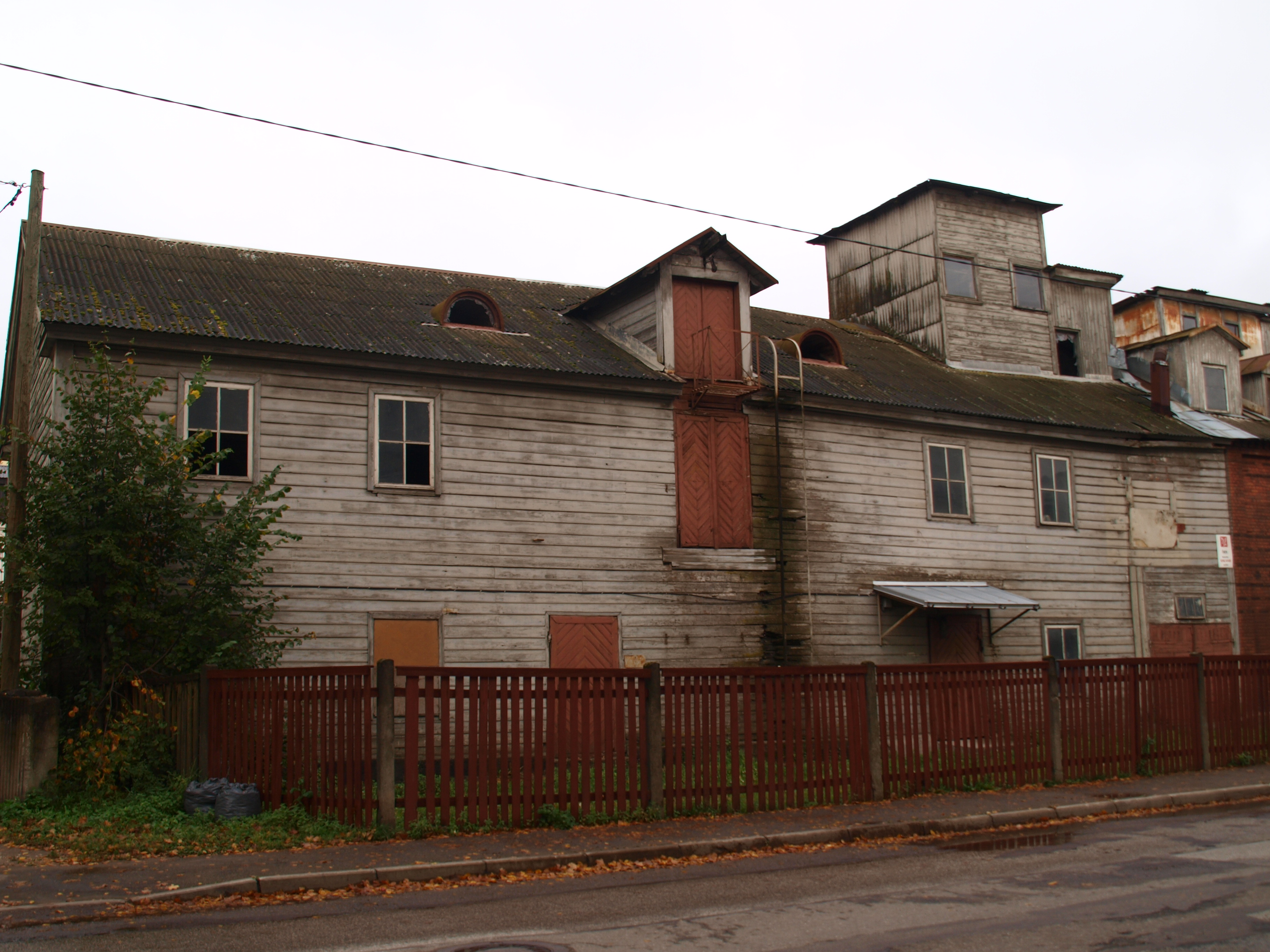 Tööstushoone Tartus Tiigi 61a, 1886.a.